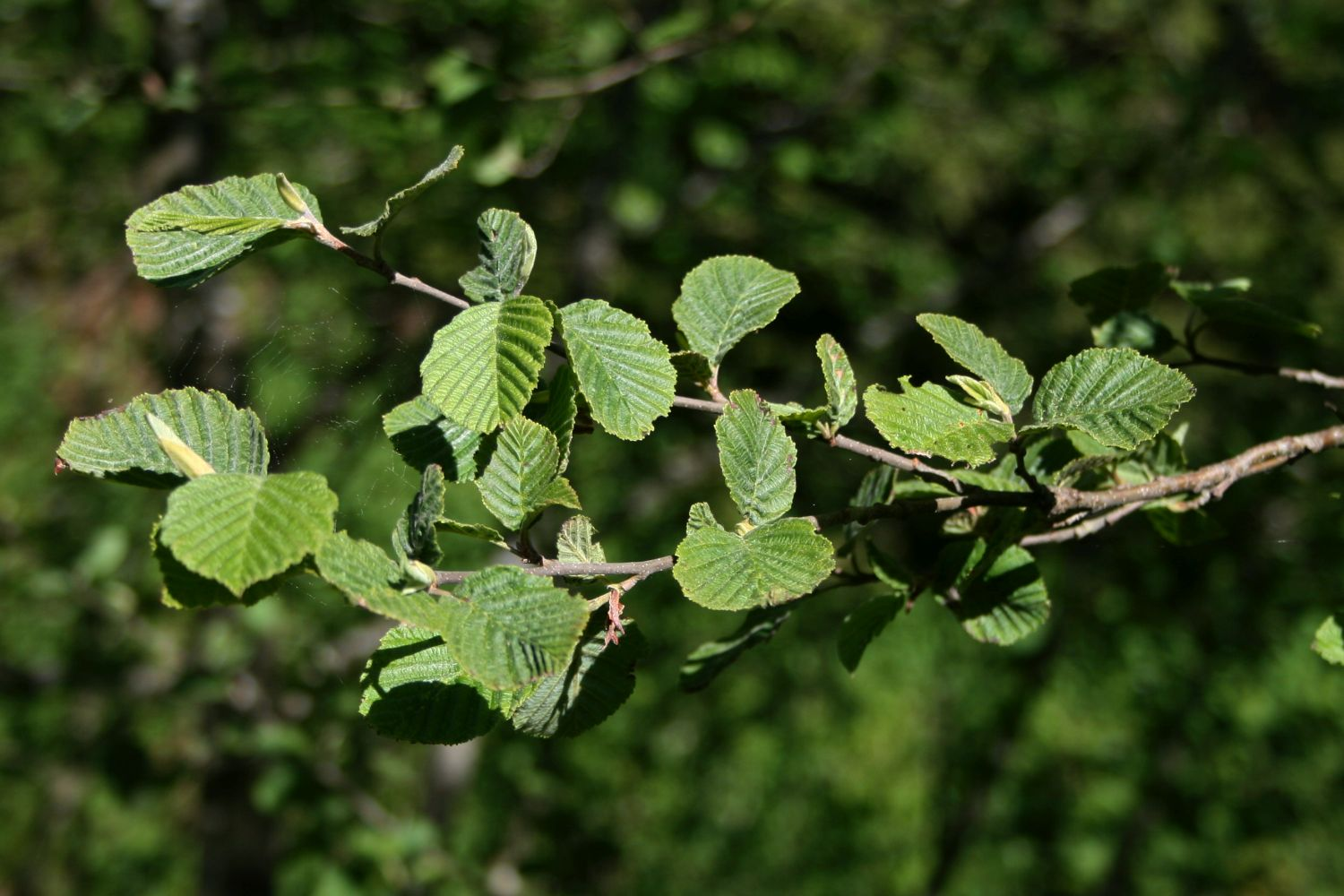 Grau-Erle (Alnus incana), Birkengewächse (Betulaceae) – Österreich/Austria/Autriche: Tirol, Kitzbüheler Alpen, Jochbergwald ca. 2,5 km N Pass Thurn, ca. 1060 m